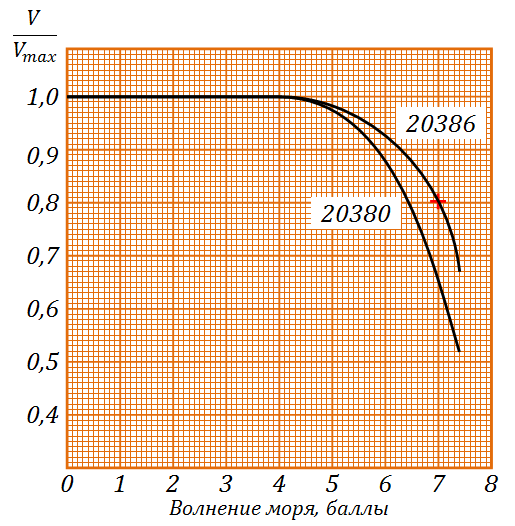 Зависимость максимальной скорости от волнения моря для корветов проектов 20380 и 20386. «Корветы: сегодня и завтра» — «Национальная оборона" №6, 2015